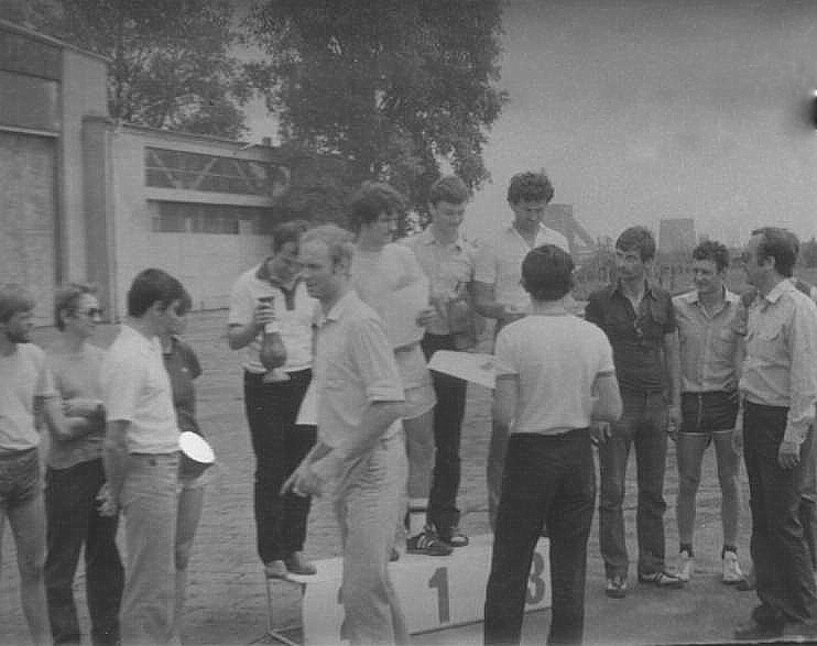 VII Międzynarodowe Klubowe Zawody Spadochronowe Gliwice 1983. Rozdanie nagród w konkurencji relativ dla drużyn z Katowic, Lubeki, Gliwice I (Jan Isielenis, Mariusz Bieniek, Jan Strzałkowski) i Gliwice II (Roman Grudziński, Marcin Wilk, Witold Lewandowski) – Sekcja Spadochronowa Aeroklubu Gliwickiego